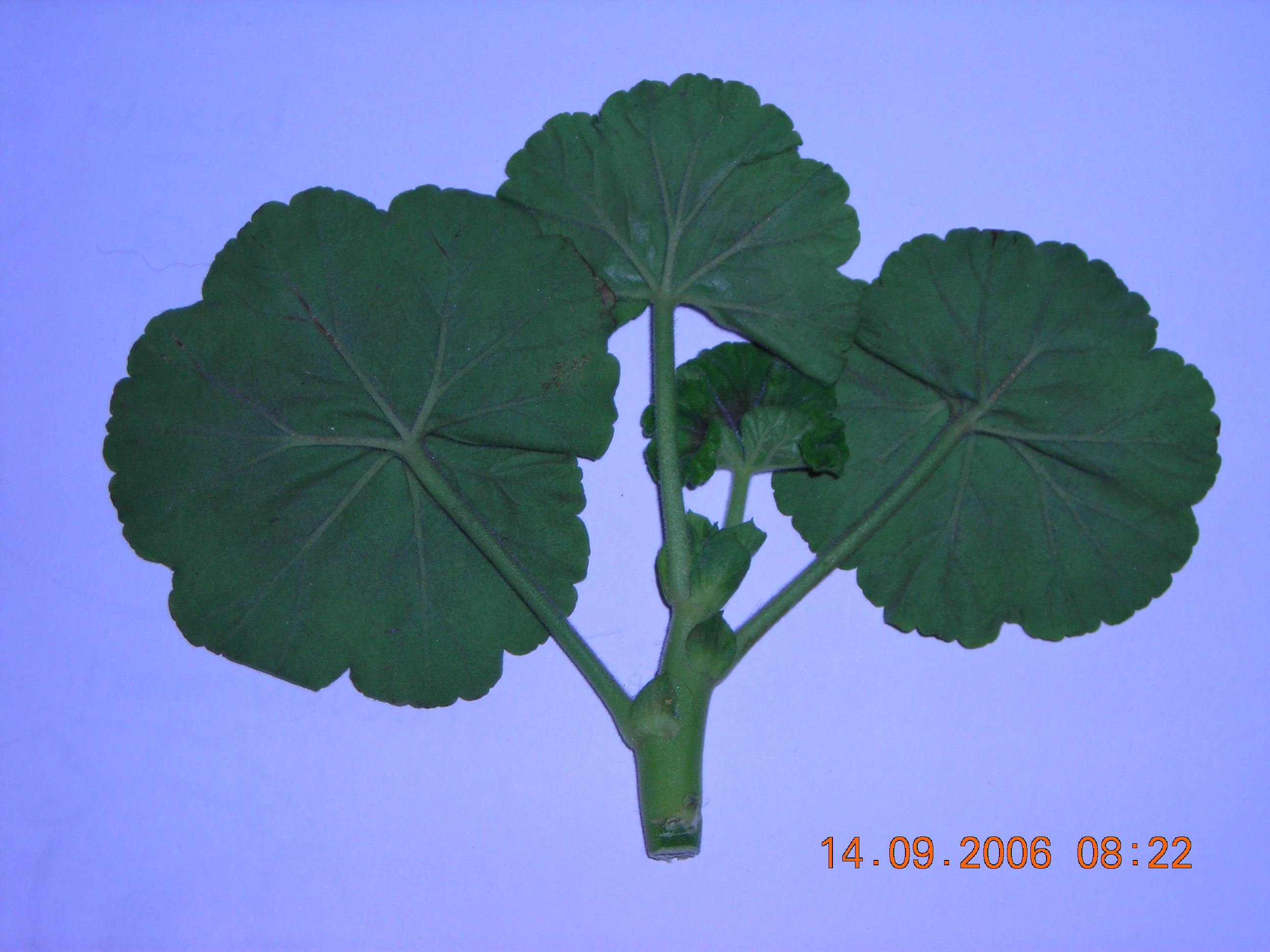 Fotografia de tallo de pelargonium hortorum